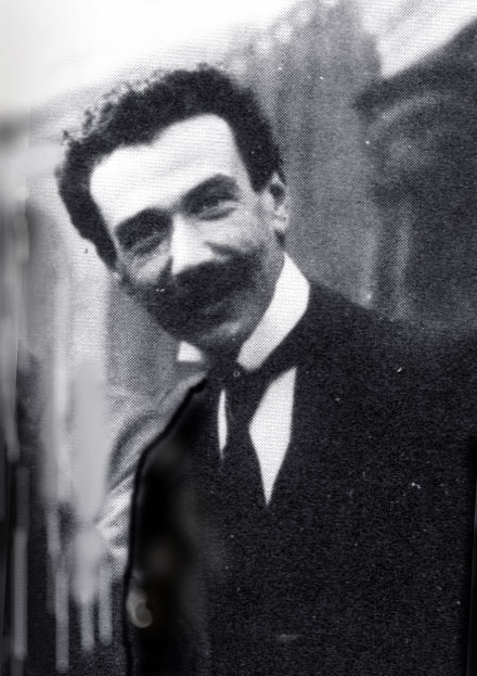 Luca Comerio, fotografo e cineasta milanese. Foto 1910